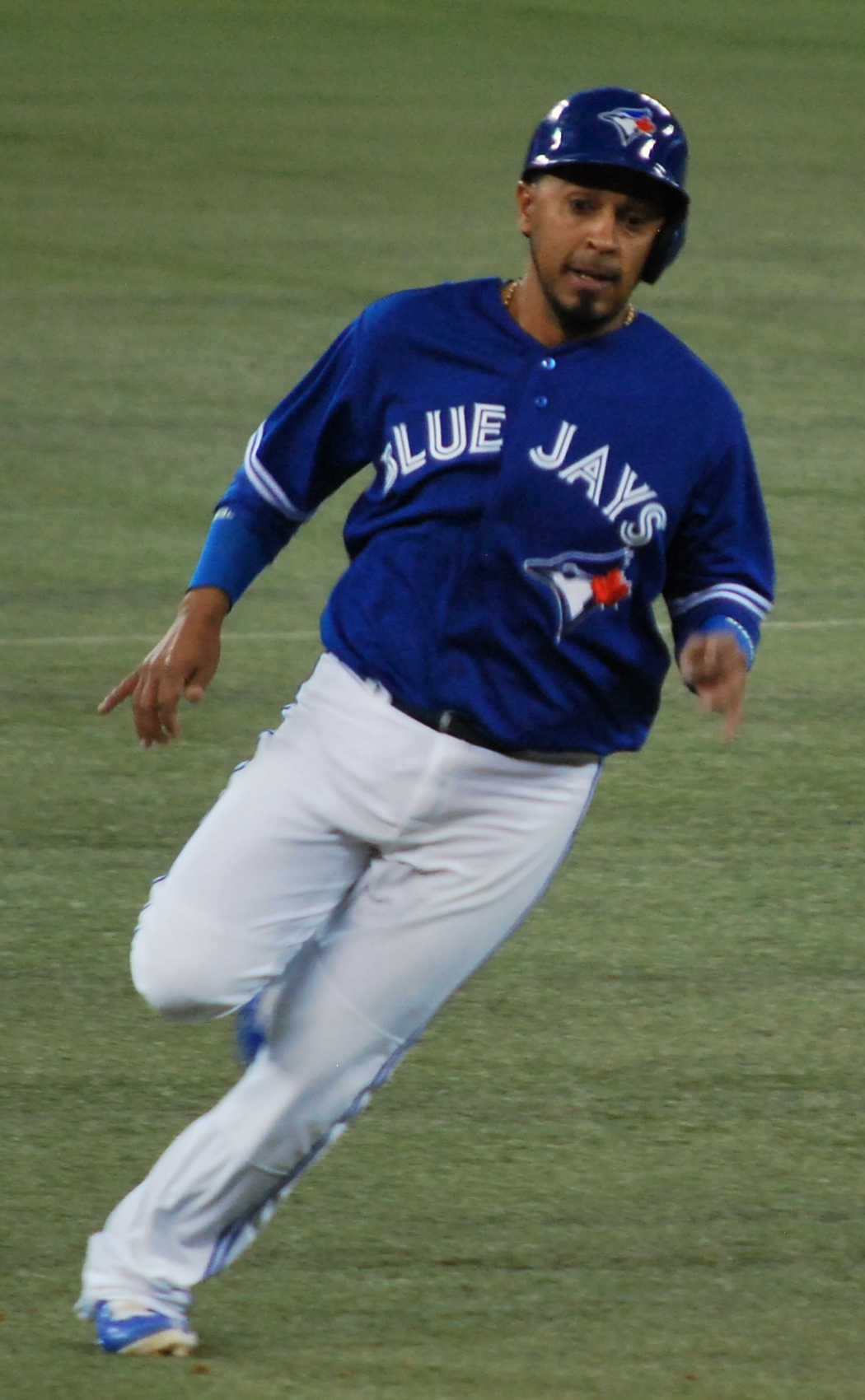 Maicer Izturis